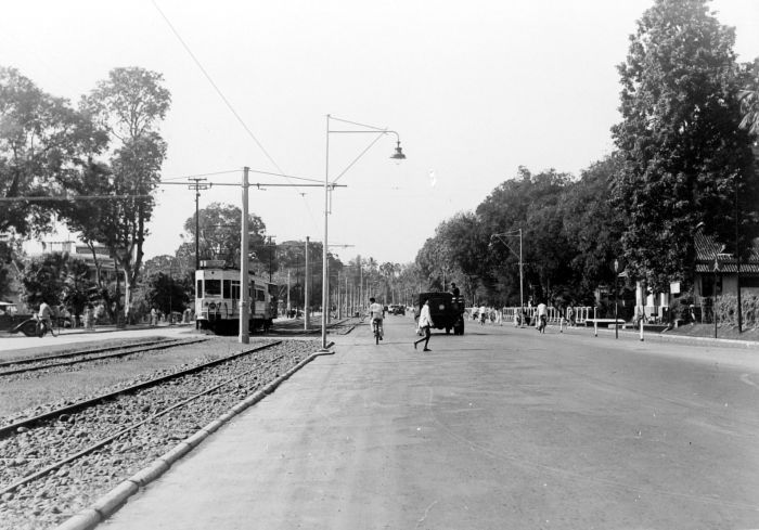 Repronegatief. Kramat- Salemba, Batavia